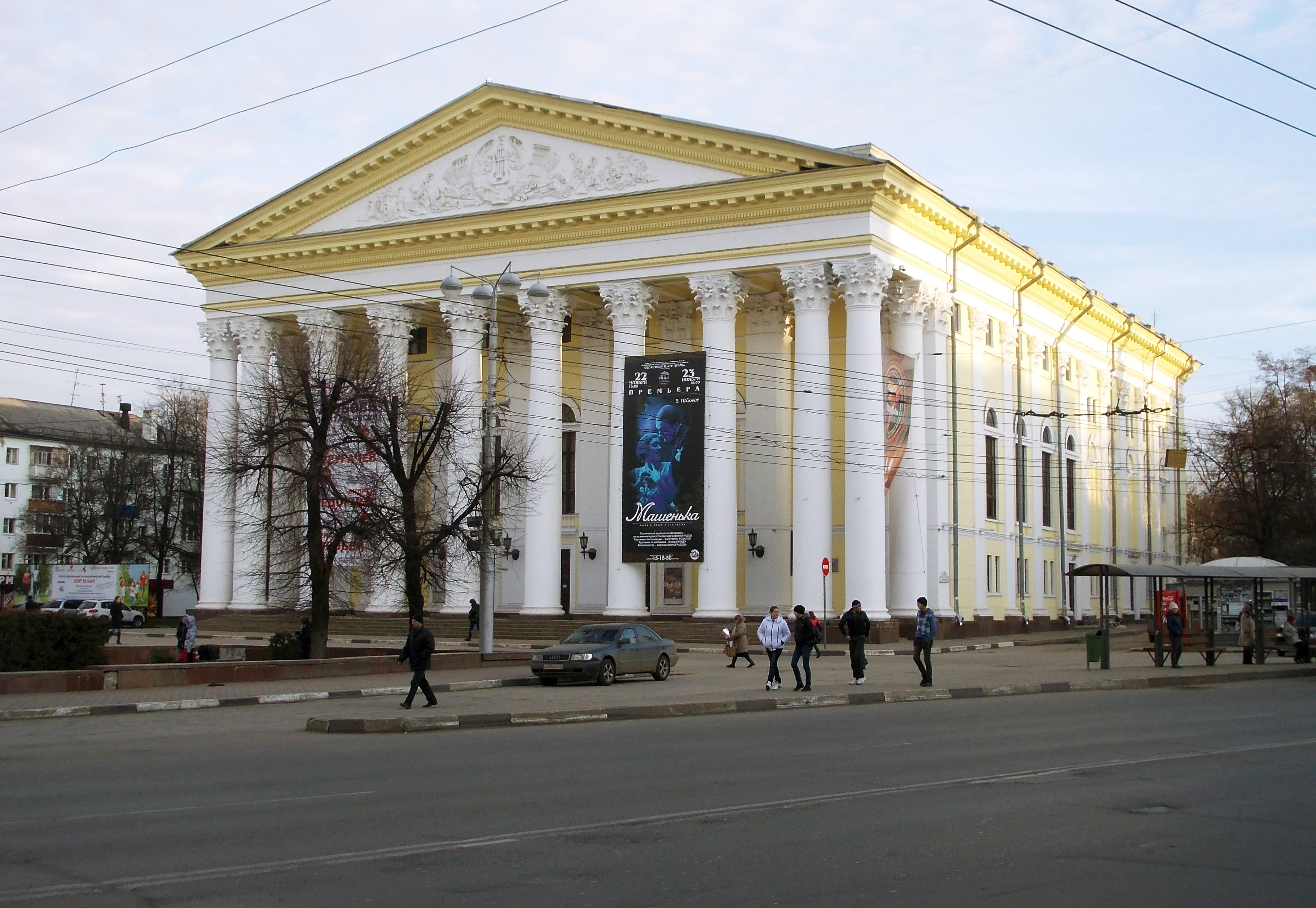 Рязанский государственный Ордена"знак Почёта"областной театр драмы.Основан в 1787 году.(нынешнее здание постройки 1961 года.)